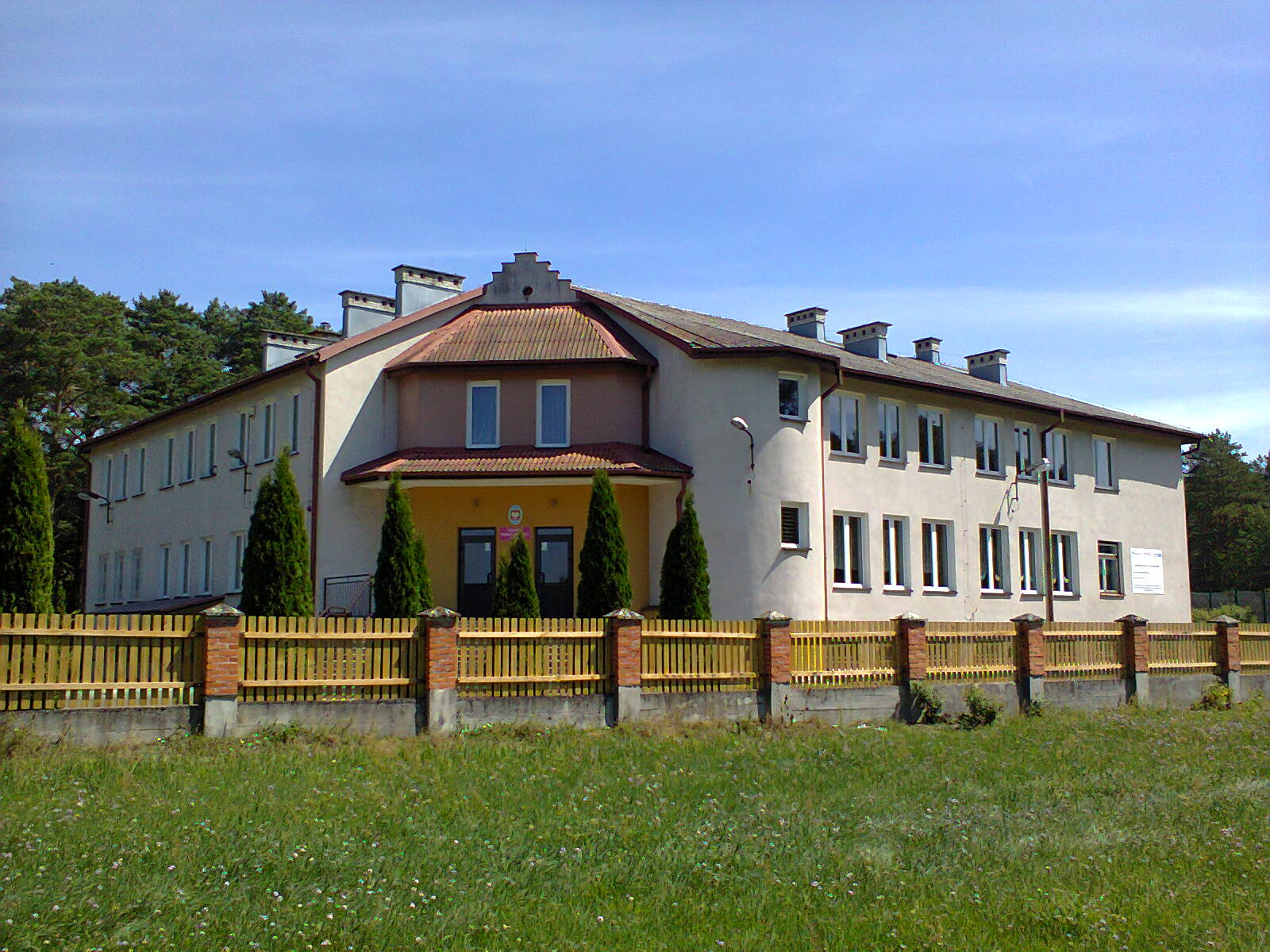 Szkoła podstawowa w Czarni (gmina Kadzidło)